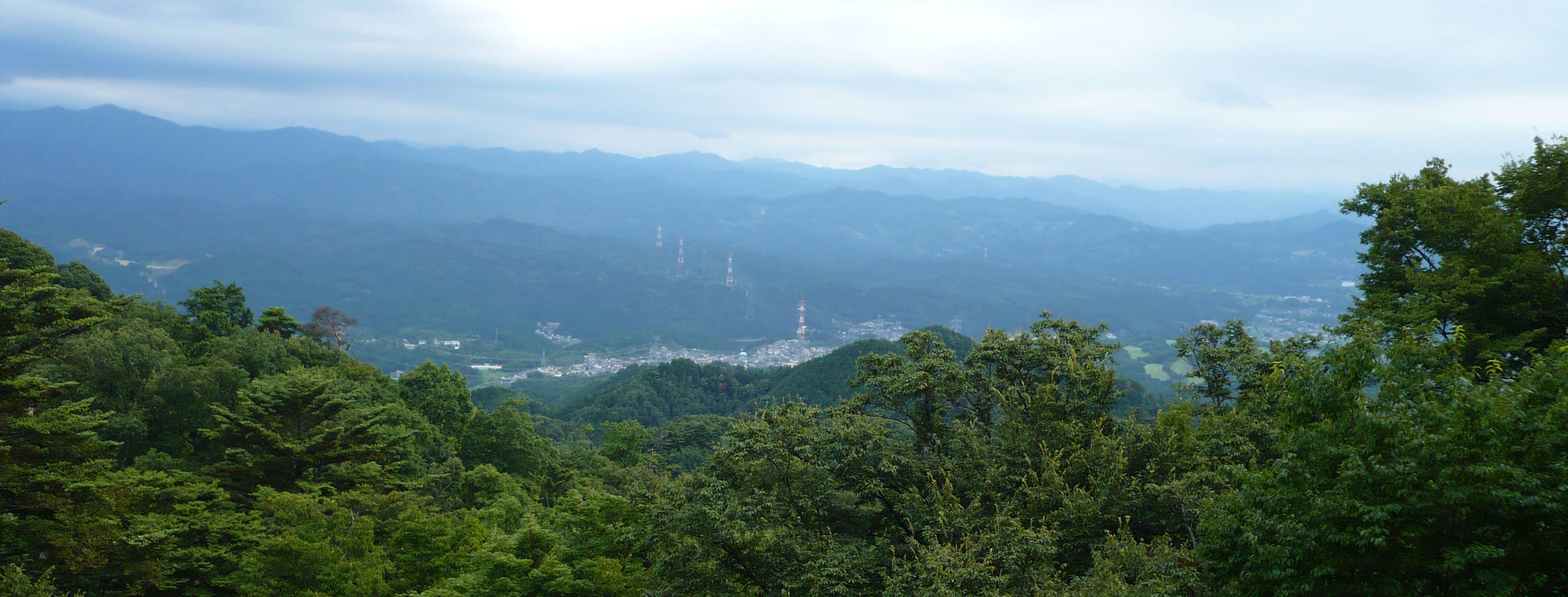 本丸部分からの眺望